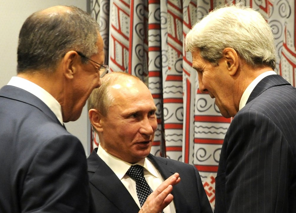 По окончании встречи с Президентом США Бараком Обамой. Владимир Путин с Министром иностранных дел Сергеем Лавровым (справа) и госсекретарём США Джоном Керри